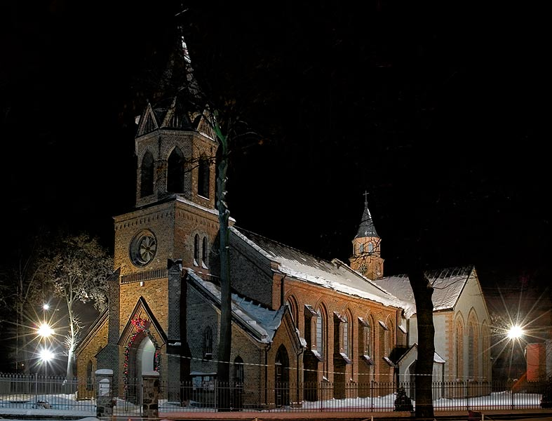 Kościół Szkolny w Sierpcu. Zdjęcie jest własnością użytkownika Michelangelo 16:17, 6 February 2007 (UTC)